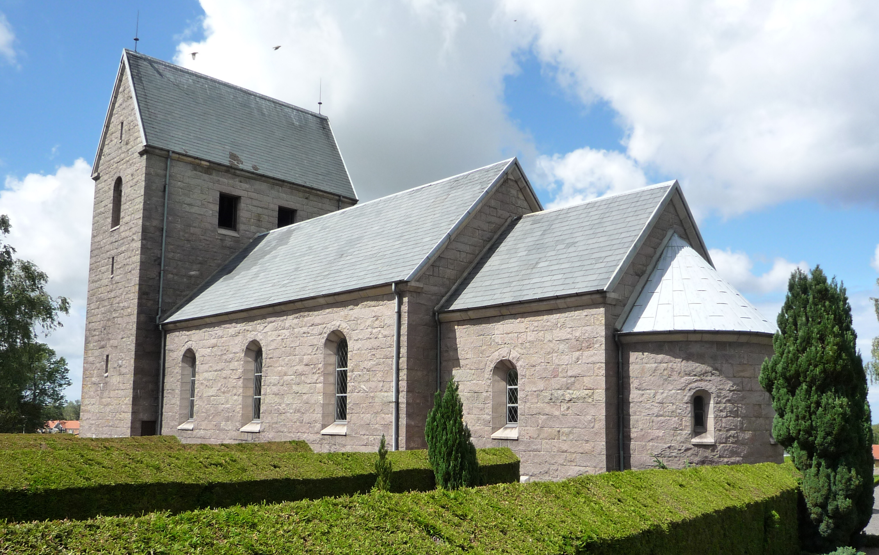 Rø Kirke on Bornholm, Denmark. From southwest